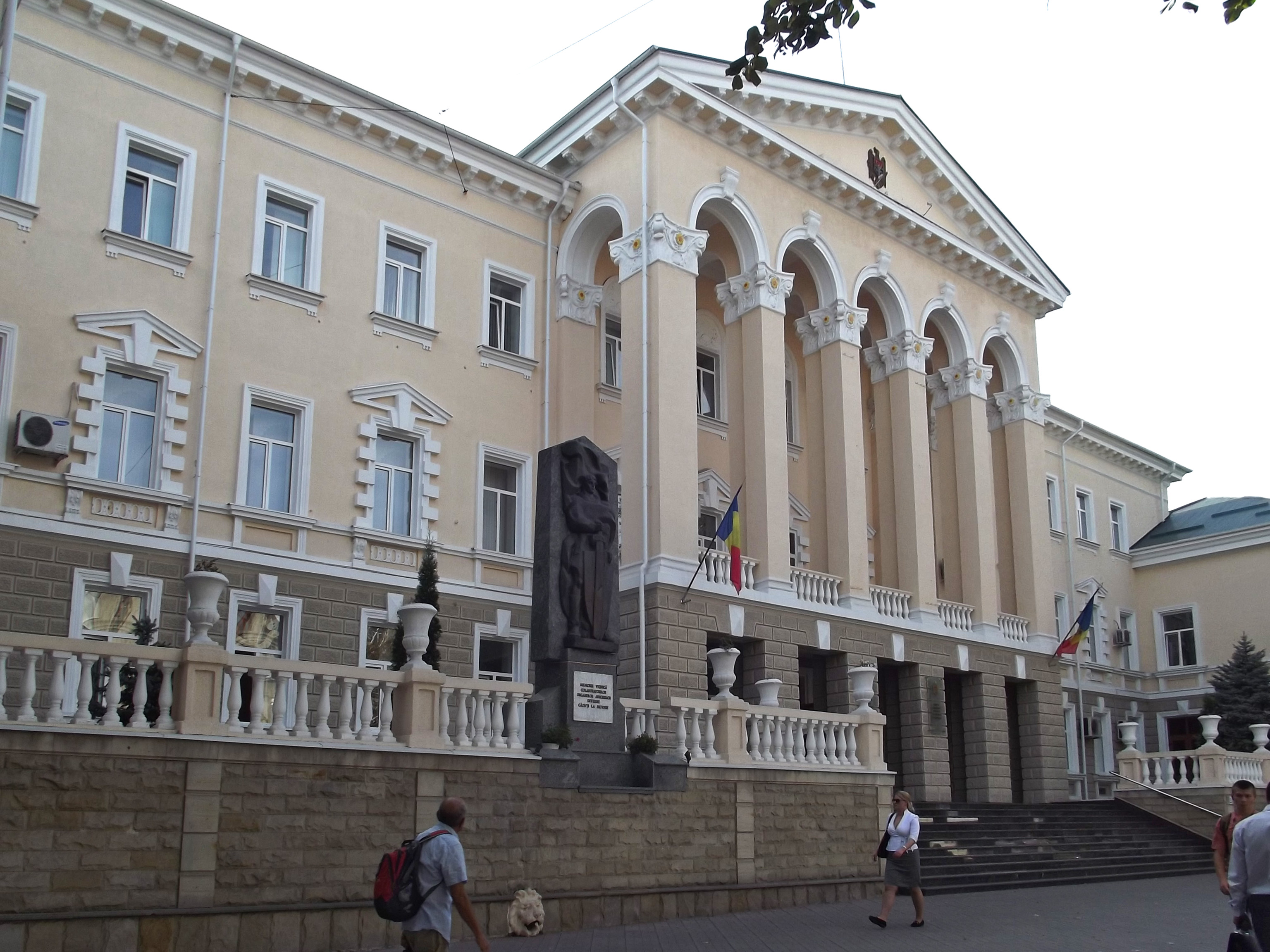 Здание МВД